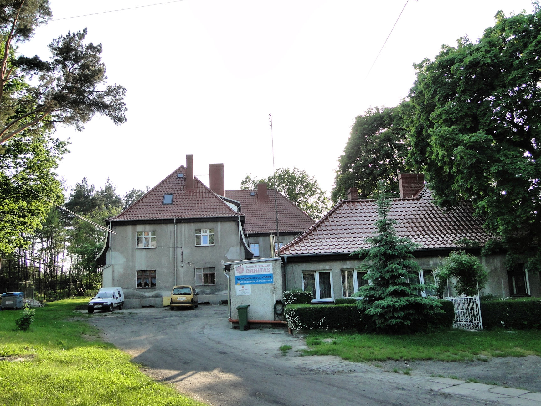 Dawna szkoła w Szczecinie Płoni